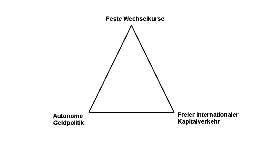 Trilemma der Wechselkurspolitik